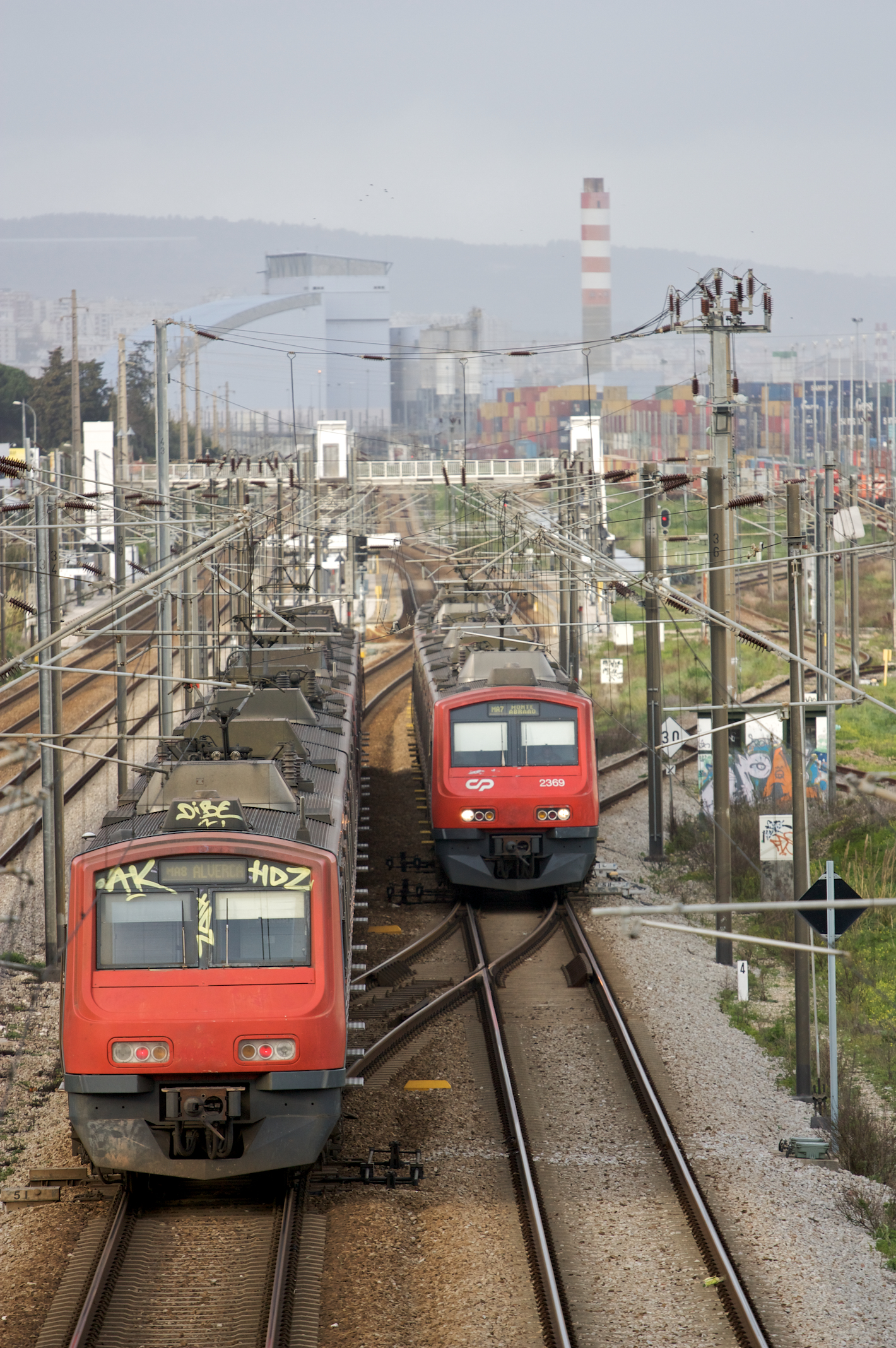 Tipo: Comboios Urbanos 18342/3 [Monte Abraão - Alverca] • 18442/3 [Alverca - Monte Abraão] Local: Bobadela [Linha do Norte, PK 10] Data e hora: 27 de Fevereiro de 2010 [17h04] Material: Automotoras 2413 e 2337 • 2369 e 23xx [Unidades Quádruplas Eléctricas]